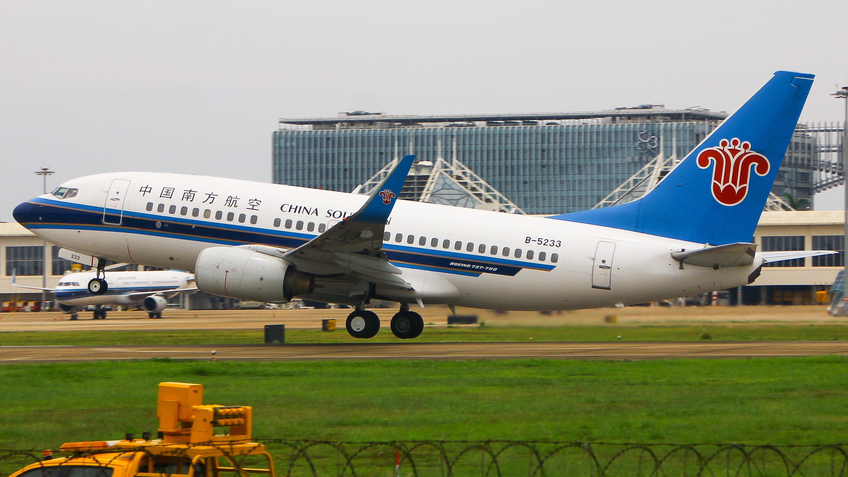 中文（中国大陆）: 中国南方航空波音737-700（B-5233）在海口美兰机场